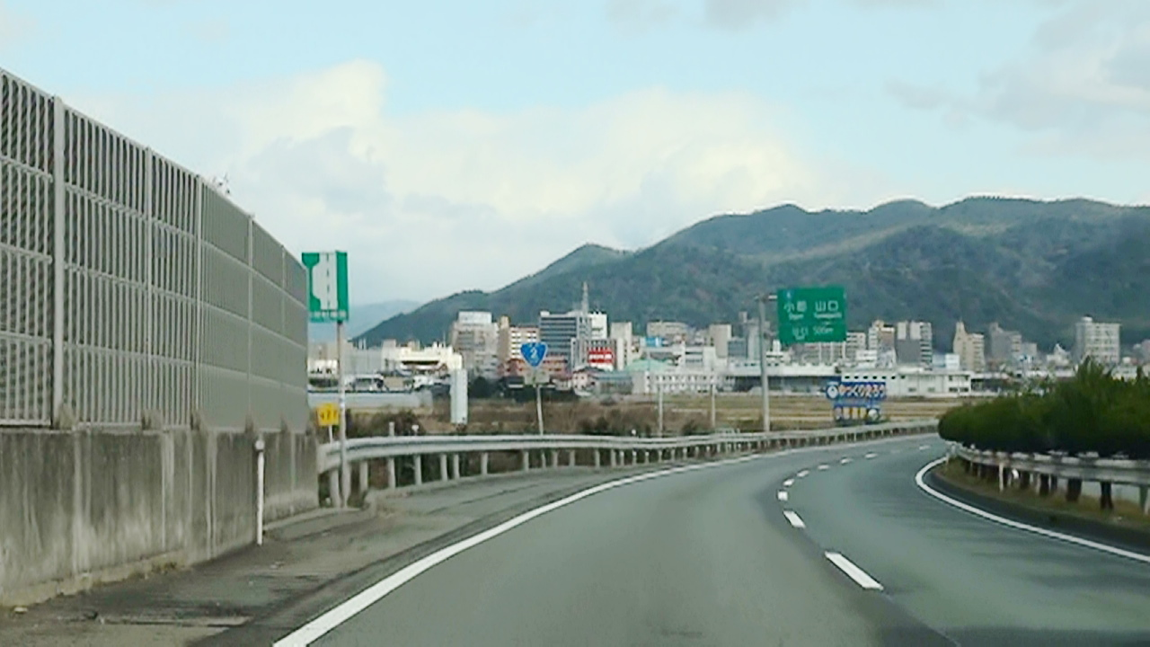 2012年1月 小郡道路小郡IC付近